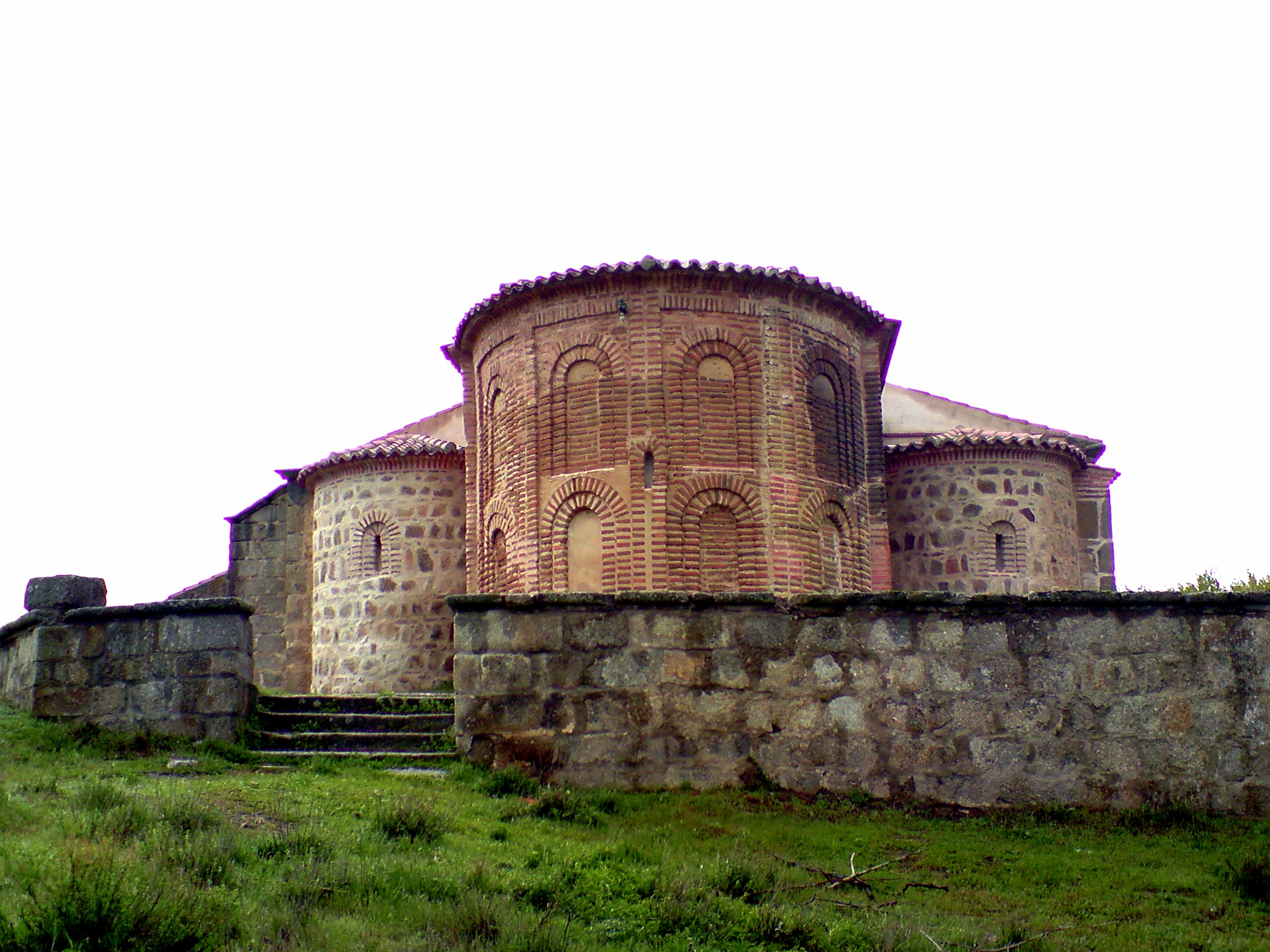 Ermita de Narros del Puerto